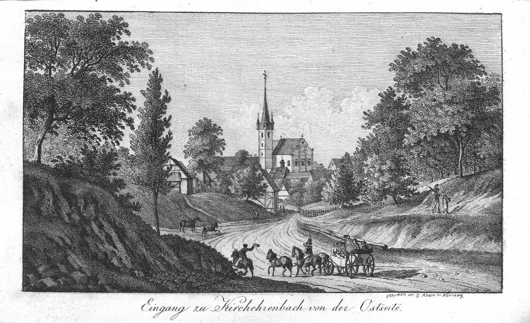 Eingang zu Kirchehrenbach von der Ostseite